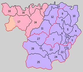 兵庫県城崎郡と後の城崎郡域の町村制時点の町村。